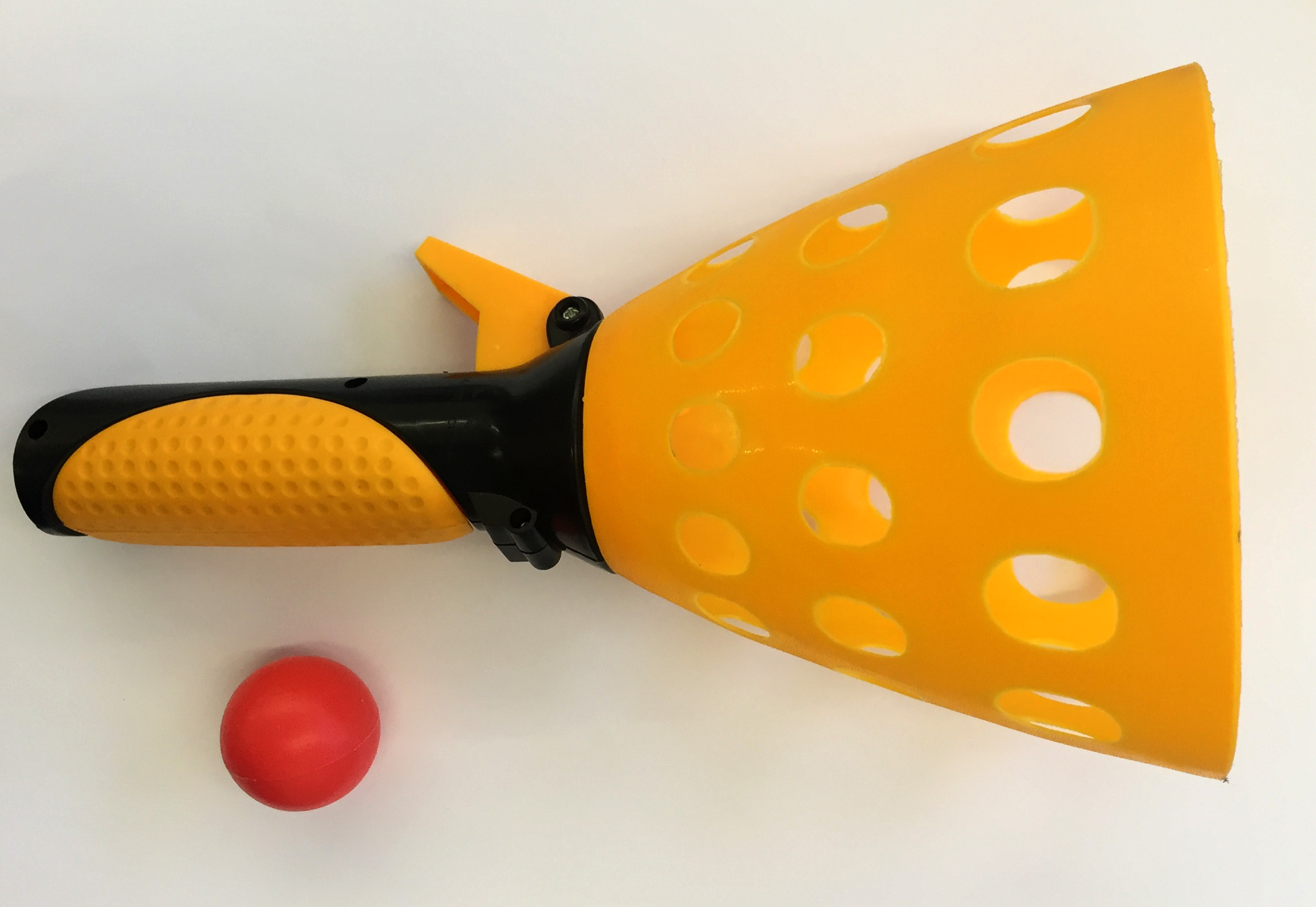 Fangbecher